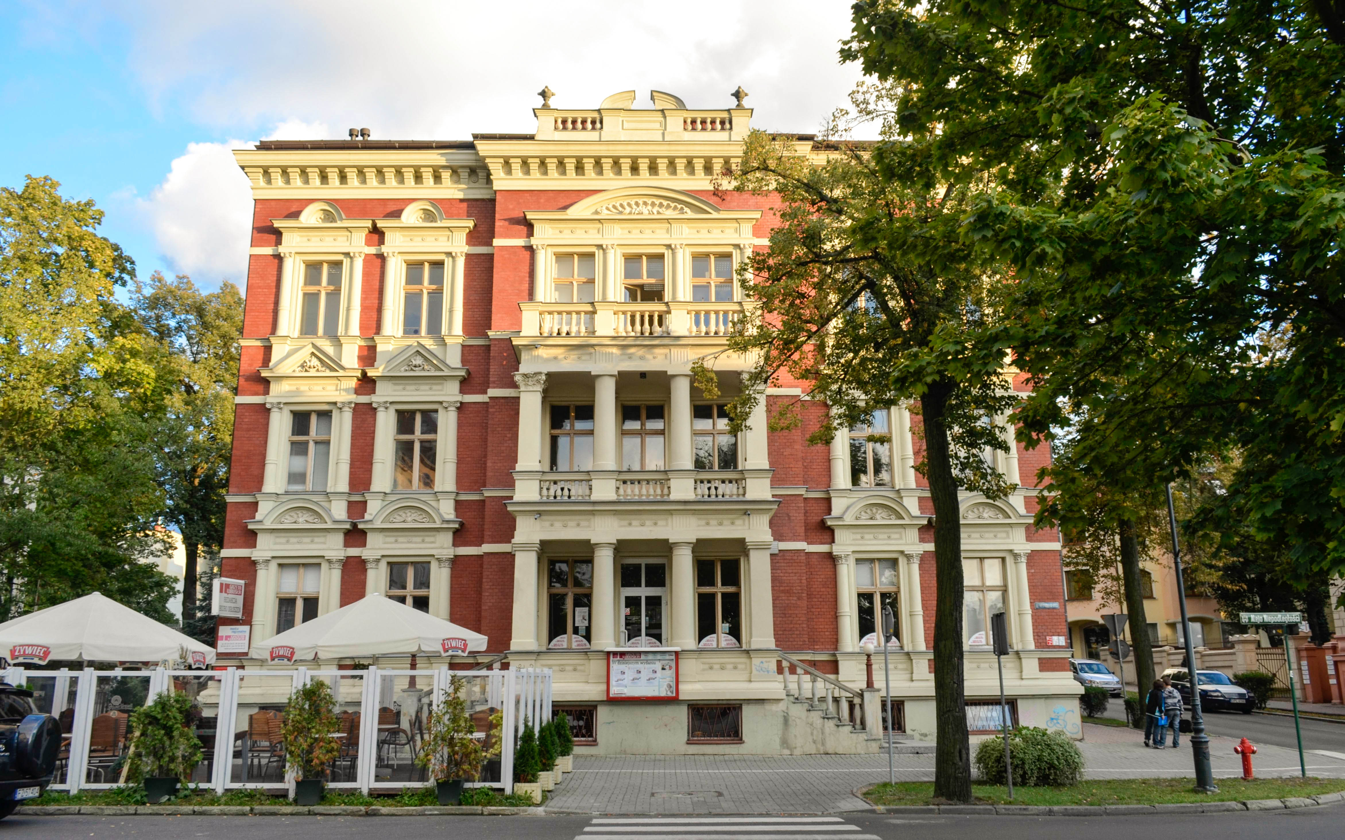 Zielona Góra, kamienica, ob. budynek biurowy (dec. dom), 1888